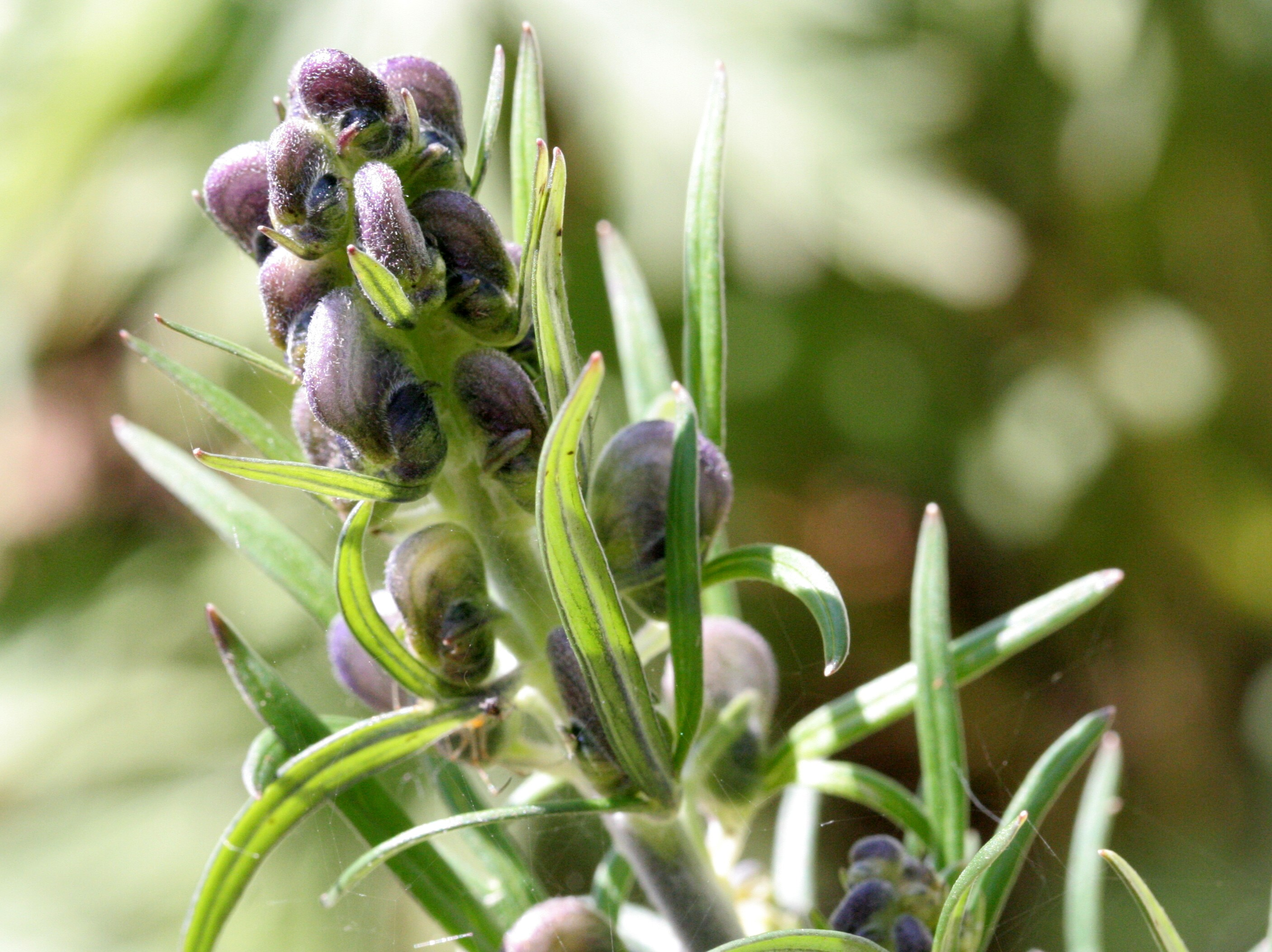 Aconitum tauricum - Località: Giardino Botanico Alpino "Giangio Lorenzoni", Pian Cansiglio, Tambre d'Alpago (BL), 1000 m s.l.m.